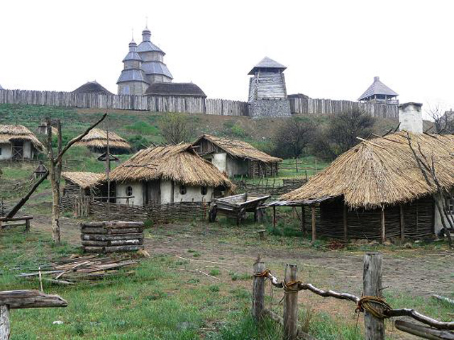 Будинки козаків 15-16 ст.